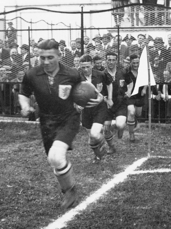 De spelers van het Nederlands elftal betreden het speelveld. Voorop Puck van Heel, gevolgd door Frank Wels en Sjef van Run. Nederland - Zwitserland (2-3), gespeeld op 27 mei 1934 in het San Siro-stadion in Milaan tijdens de Wereldkampioenschappen in Italië.